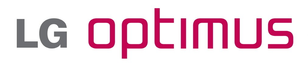 LG전자는 ‘2013 WBC’ 한국 대표팀 공식 후원사로서 선수단 유니폼 및 헬멧에 LG 옵티머스 로고를 부착하는 한편 승부 예측 이벤트, 해외 응원단 지원 등 다양한 마케팅 활동을 진행한다. 승부 예측 이벤트는 오는 2일부터 ‘옵티머스 G Pro’ 공식 홈페이지에서 시작한다.